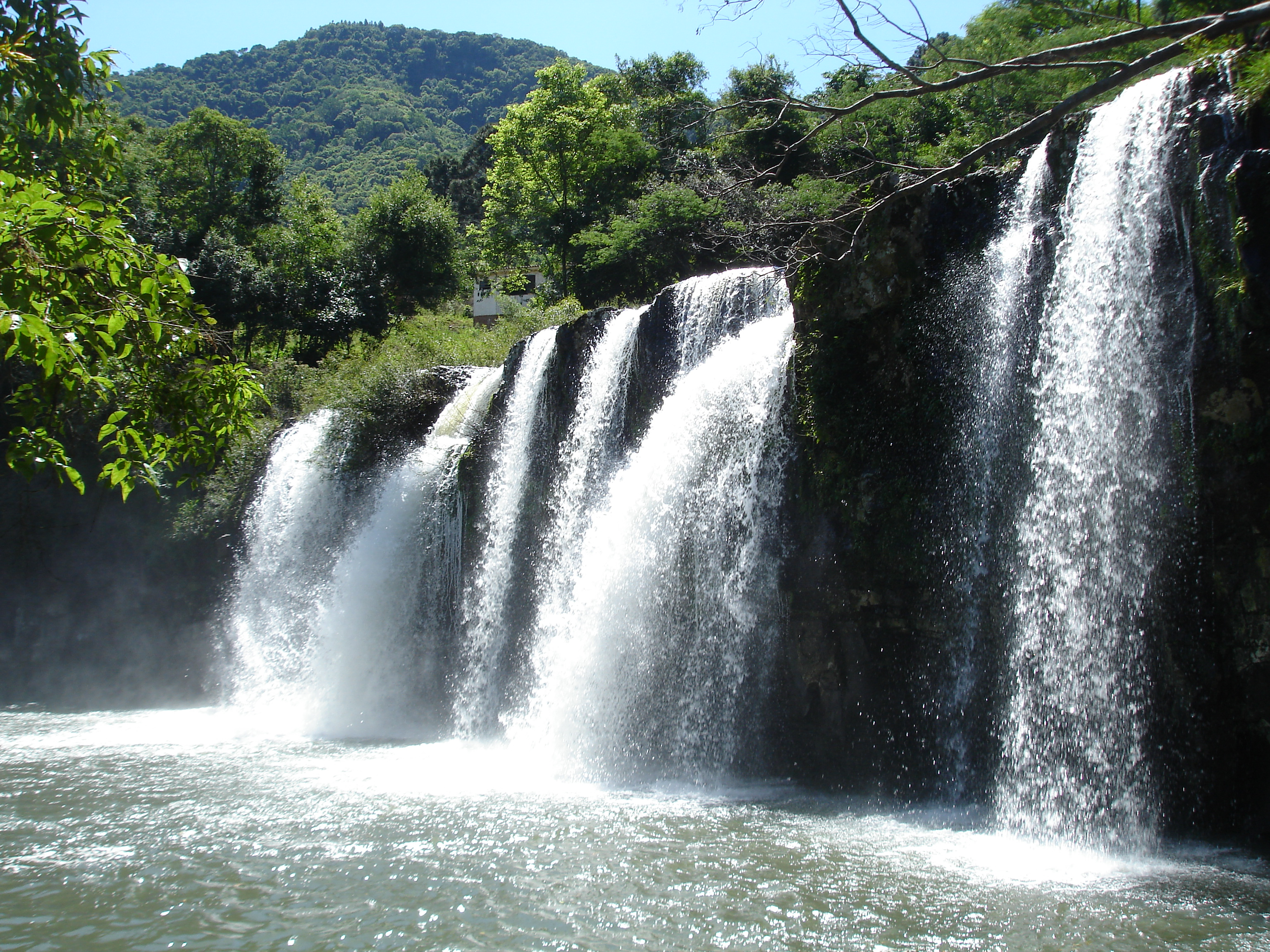 Salto do Rio Pardinho, localizado na RPPN da Unisc.